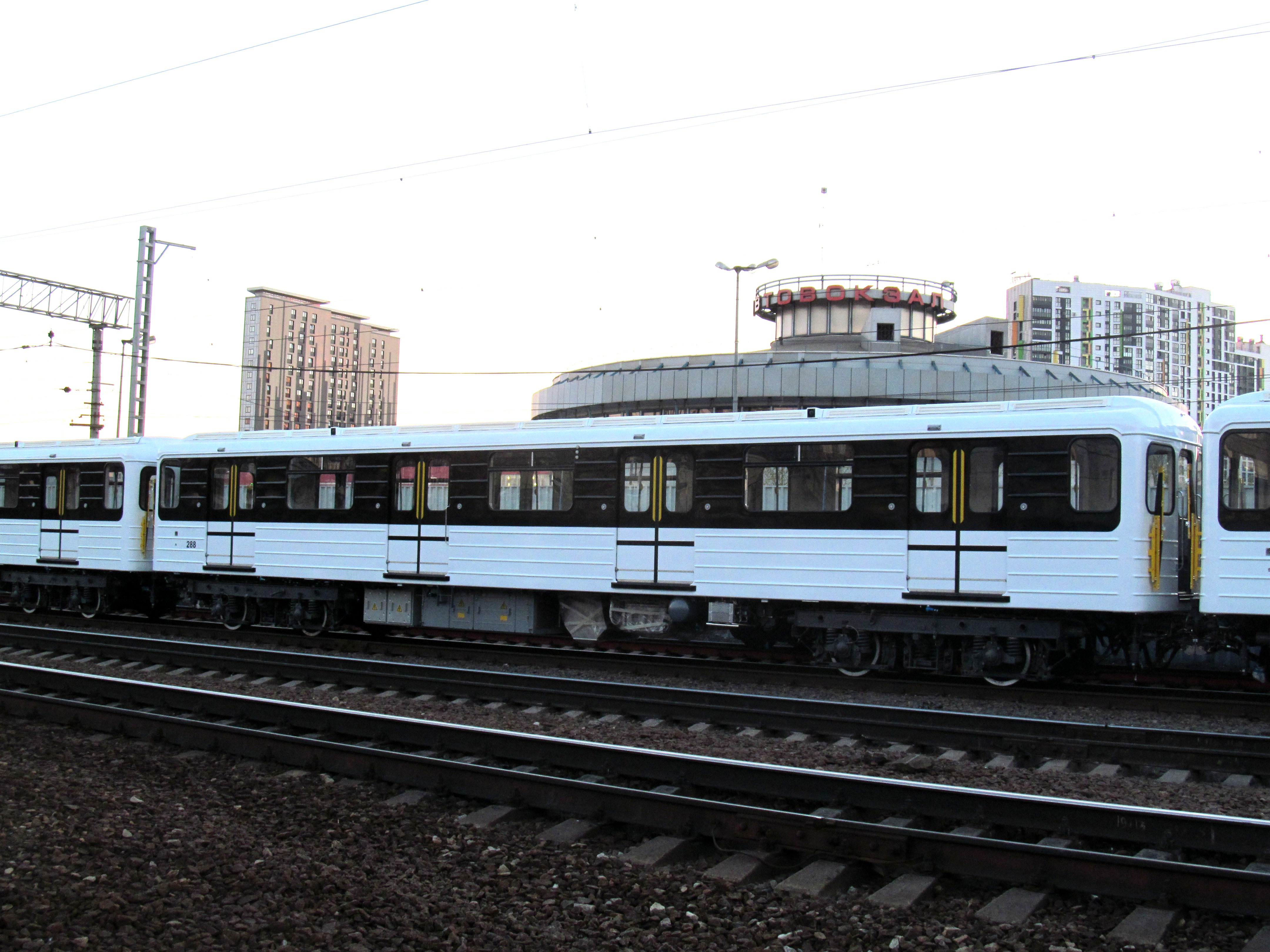 Метровагон 81-714.2К № 288 на станции Мытищи (подготовлен к отправке с завода)